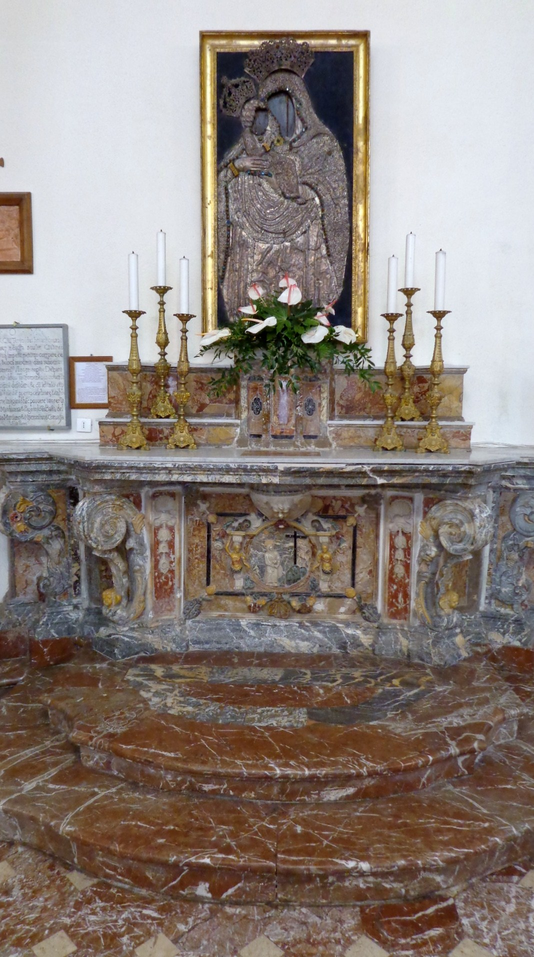 Altare